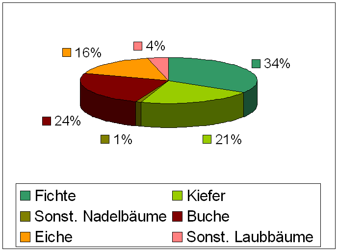 Baumartenzusammensetzung im Schönbuch